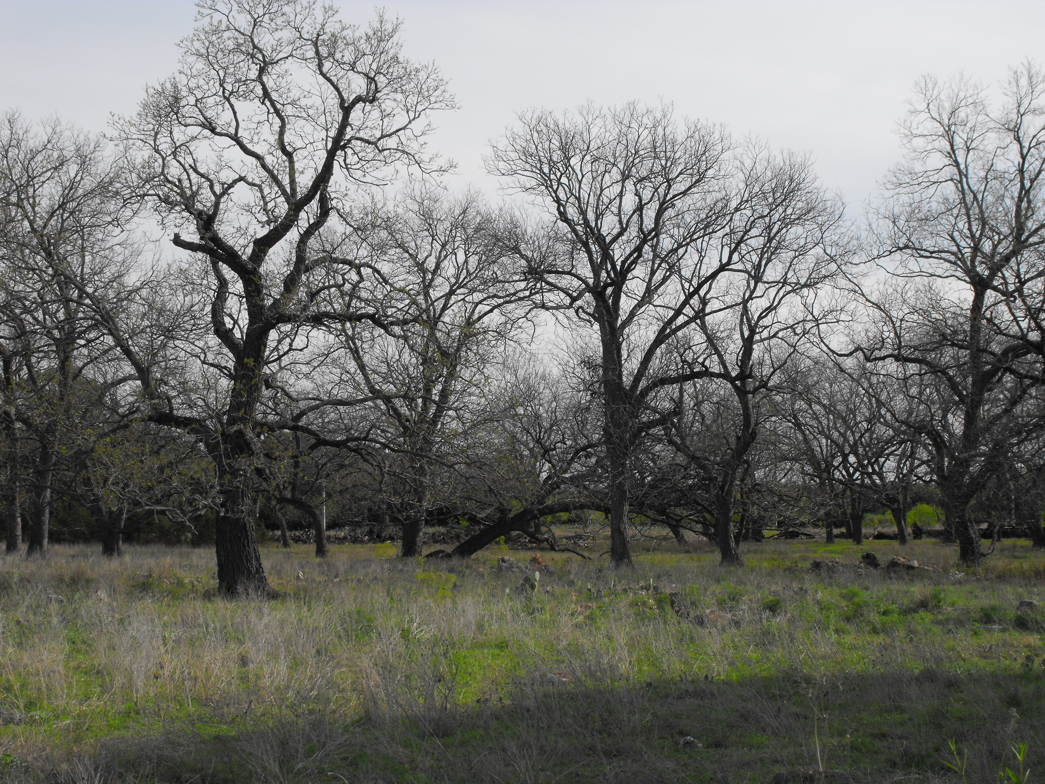 Oak Savanna in Texas